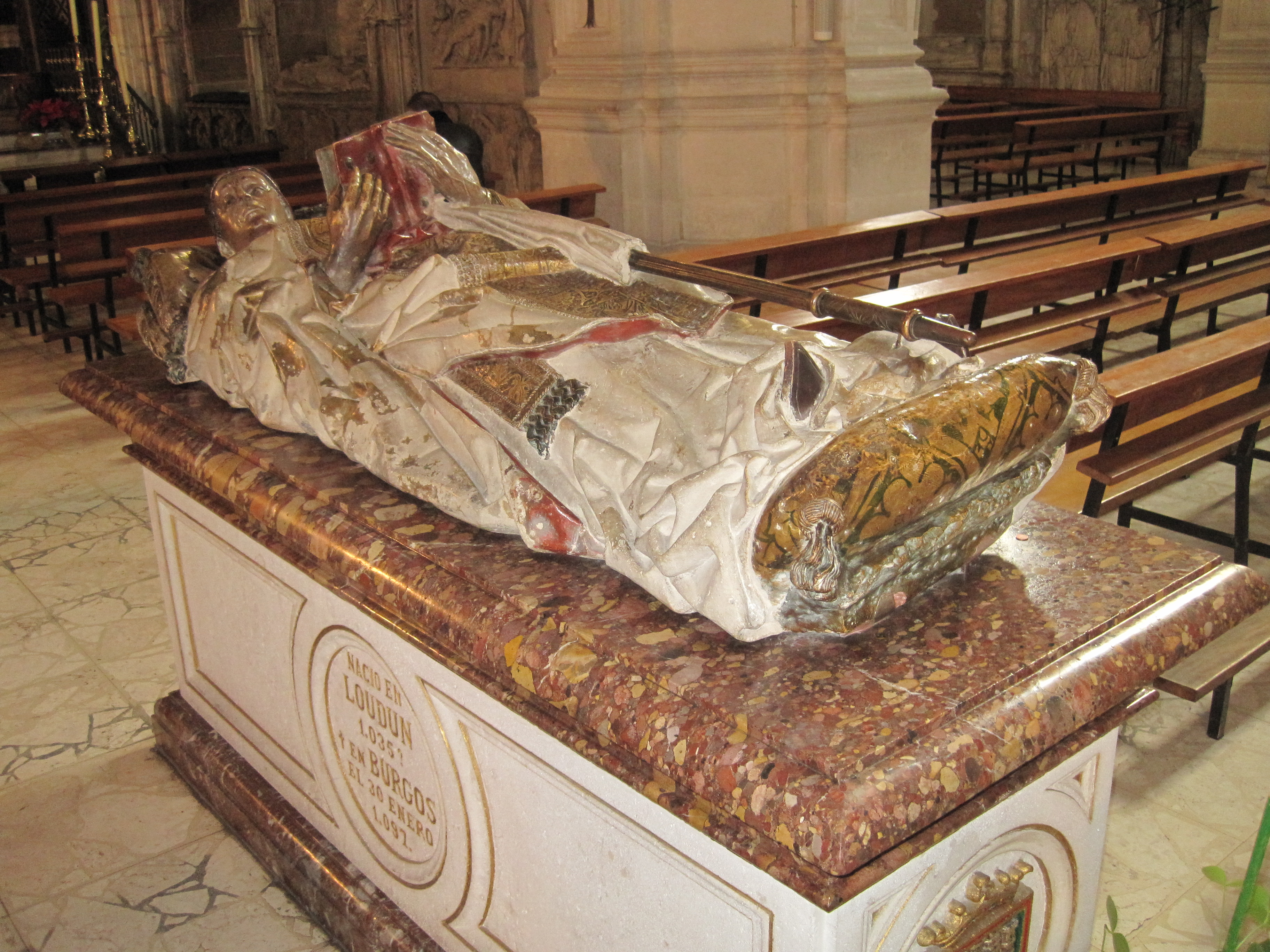 Tumba del santo San Lesmes, en la inglesia de su nombre, en la ciudad de Burgos.